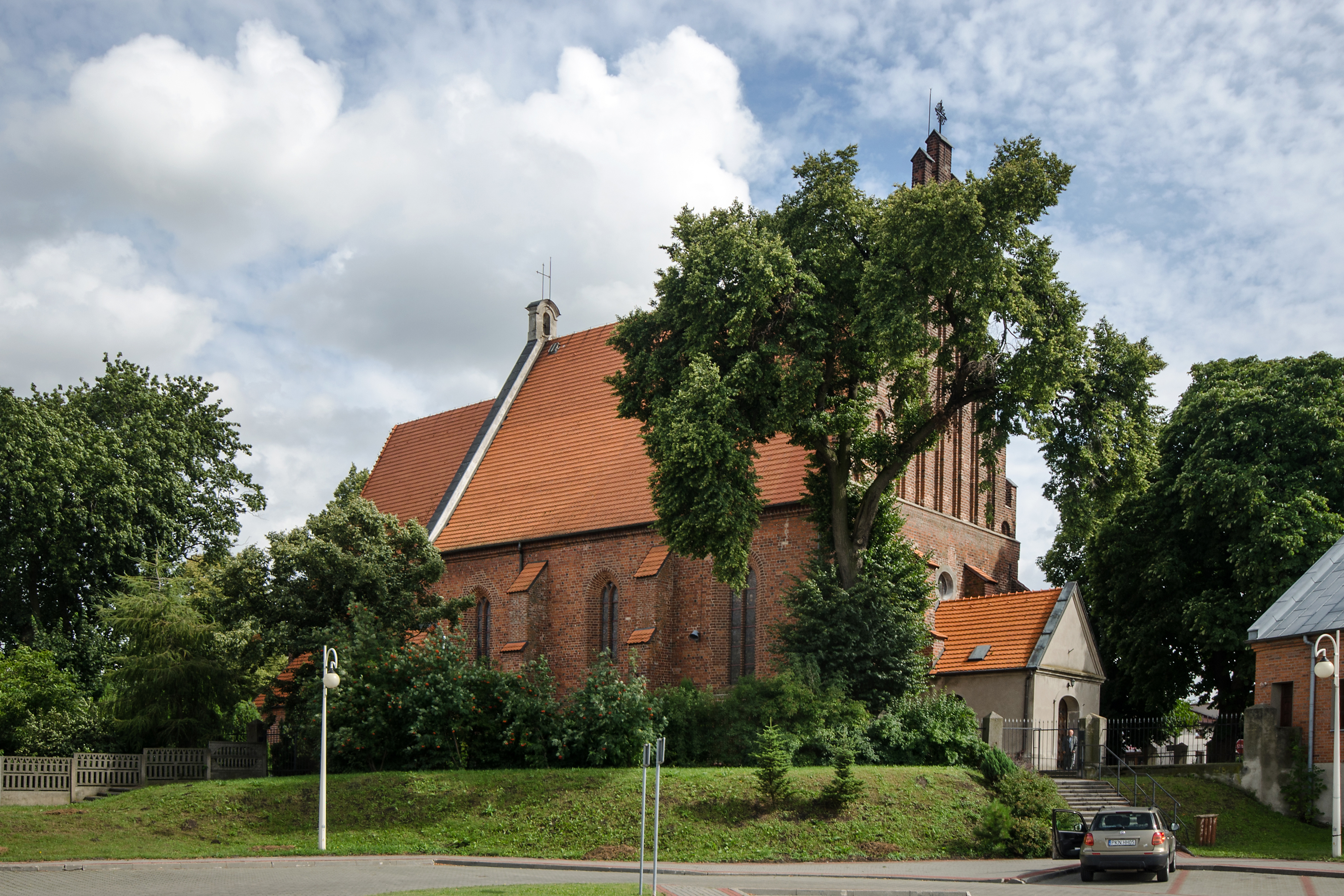 Kleczew, kościół par. p.w. św. Andrzeja Apostoła, 2 poł. XIV, pocz. XVI, 1866-1872, 1905